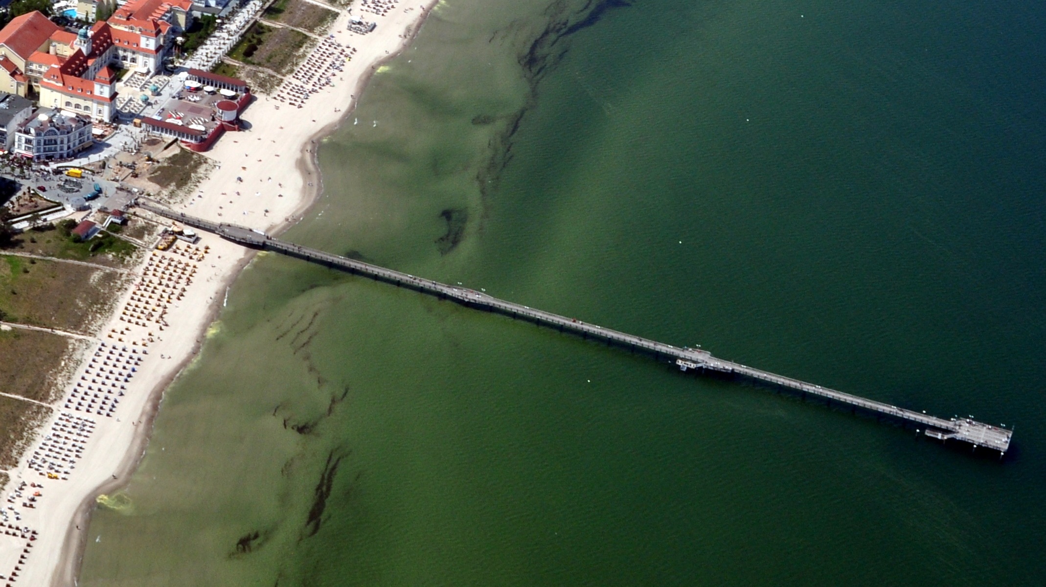 Die Bilder wurden von mir während eines einstündigen Rundflugs ab Flugplatz Güttin am 21. Mai 2011 aufgenommen. Die Bildbeschreibung steht im Dateinamen. Aufgenommen mit einer Nikon D5000 durch das Seitenfenster des Flugzeugs.